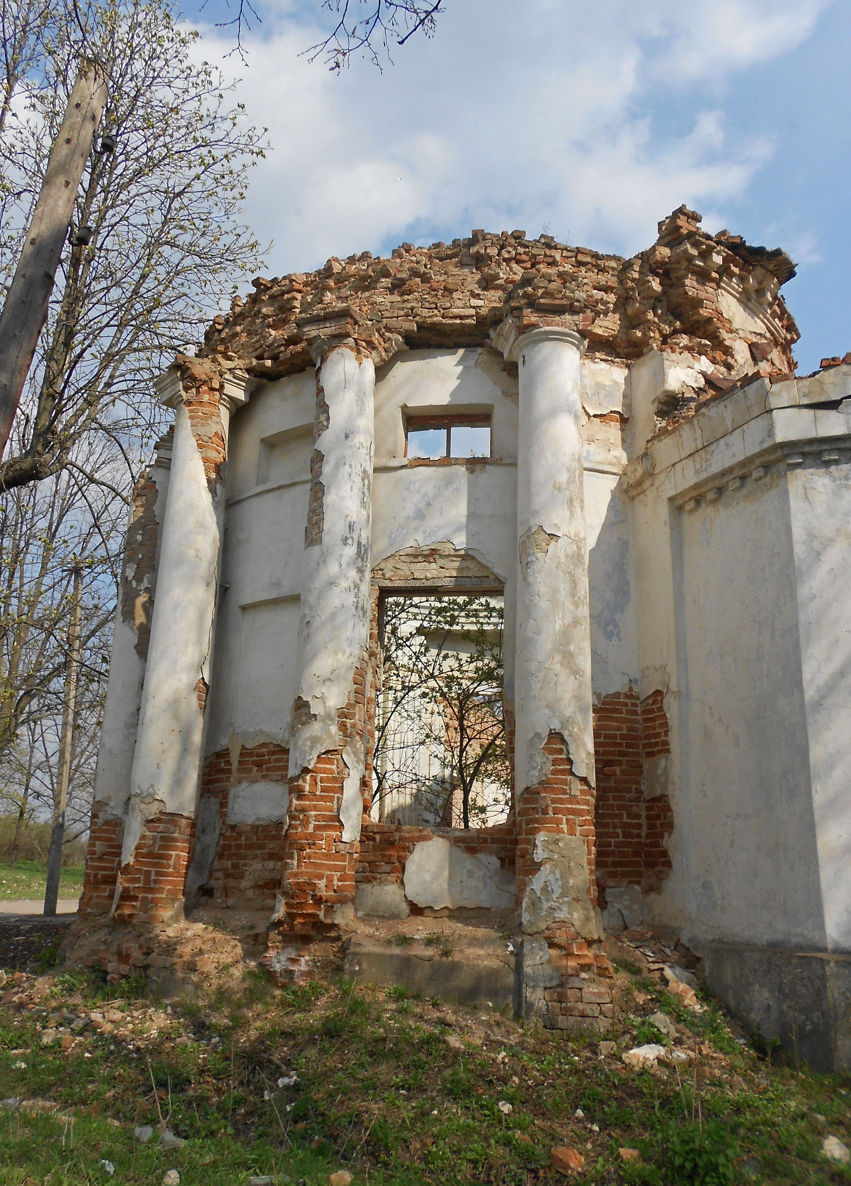 Замiська садиба (мур.), Люботин, пл.Жовтнева